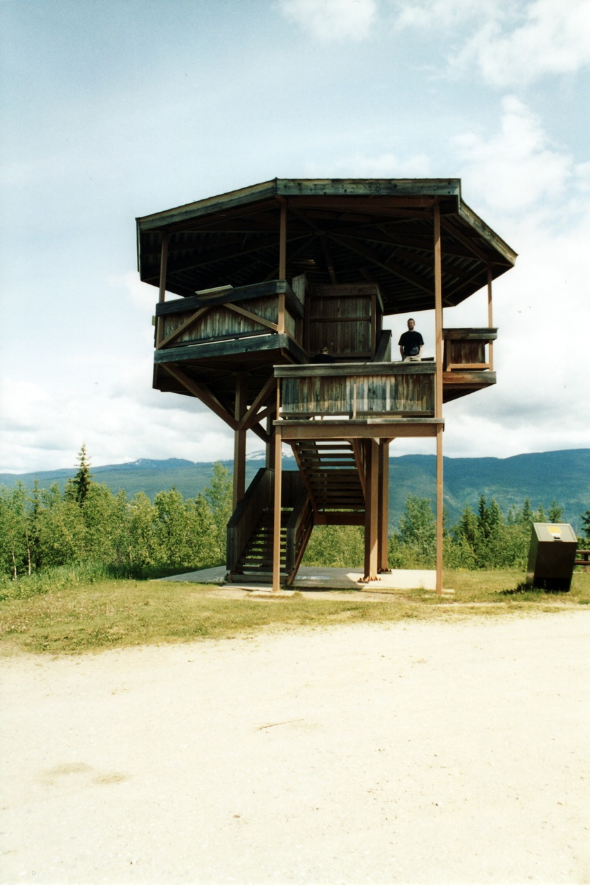 Aussichtsturm auf dem Green Mountain (Wells Gray Provincial Park)